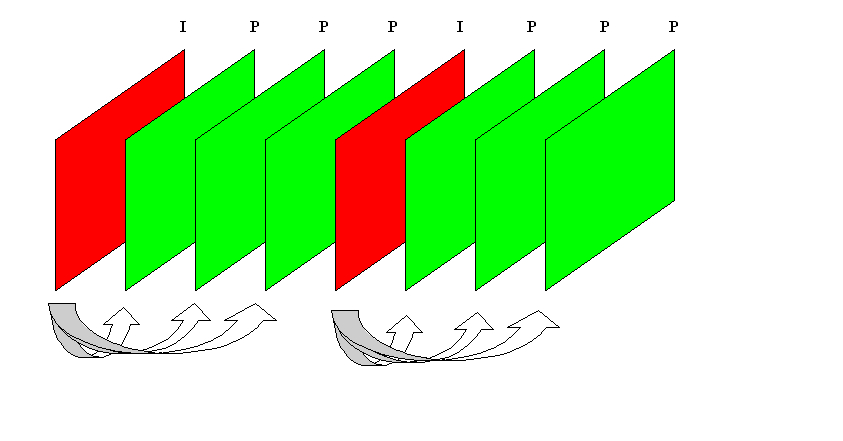 CIF sequence